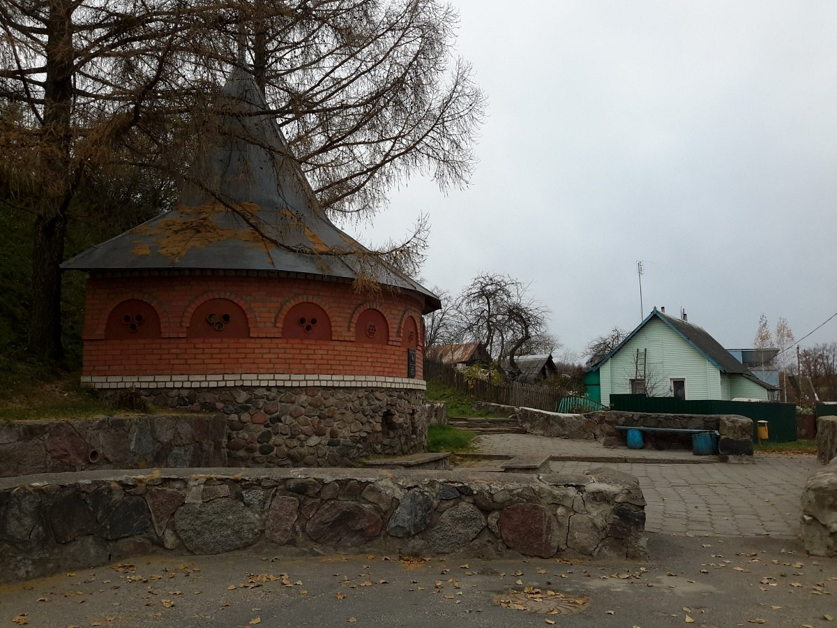 Сянно. Крыніца